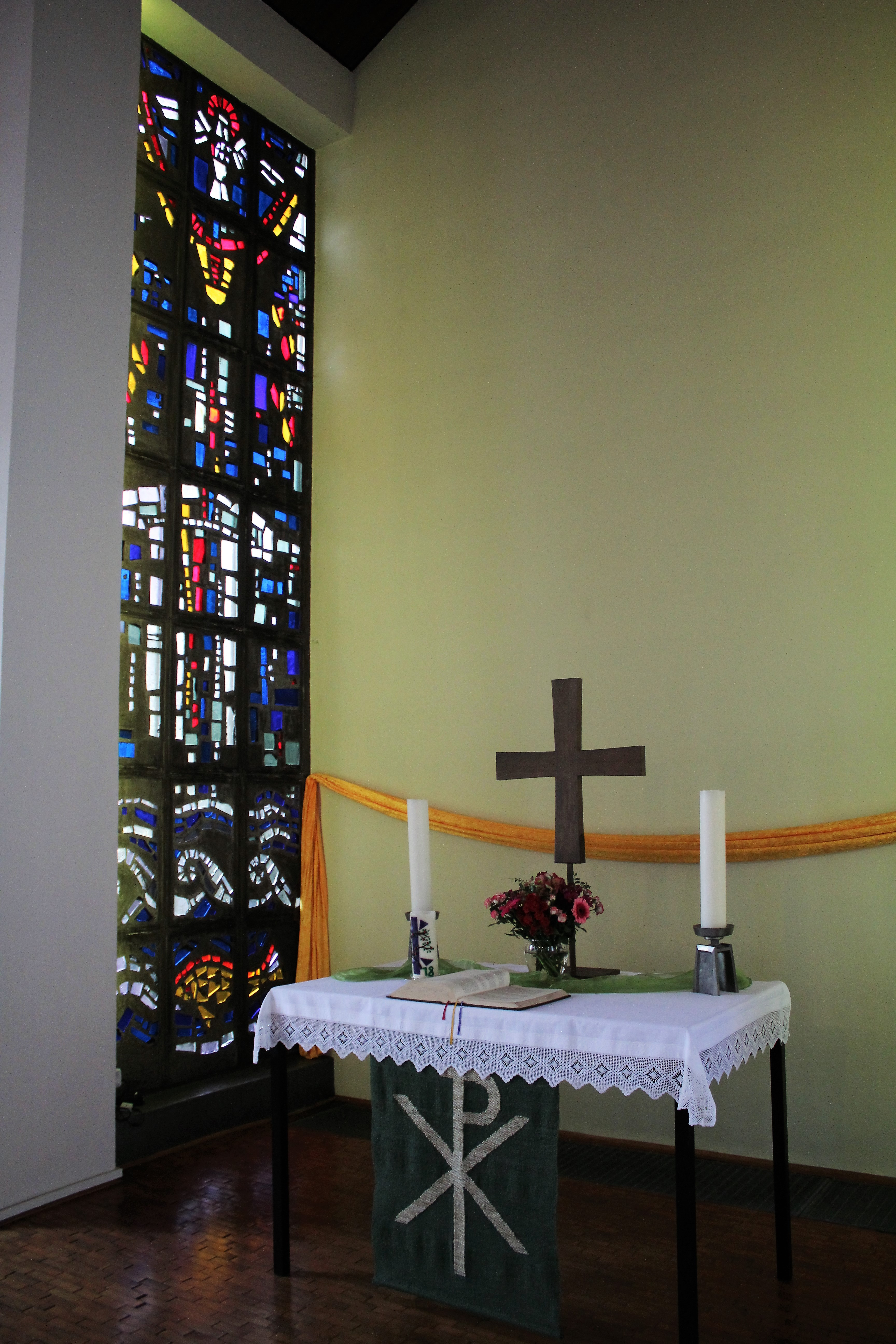 Ev. Kirche Espa, Langgöns, Landkreis Gießen, Hessen, Deutschland